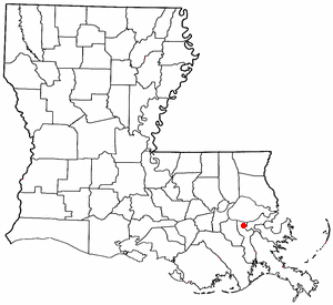 Volapük: Topam in tat: Louisiana.